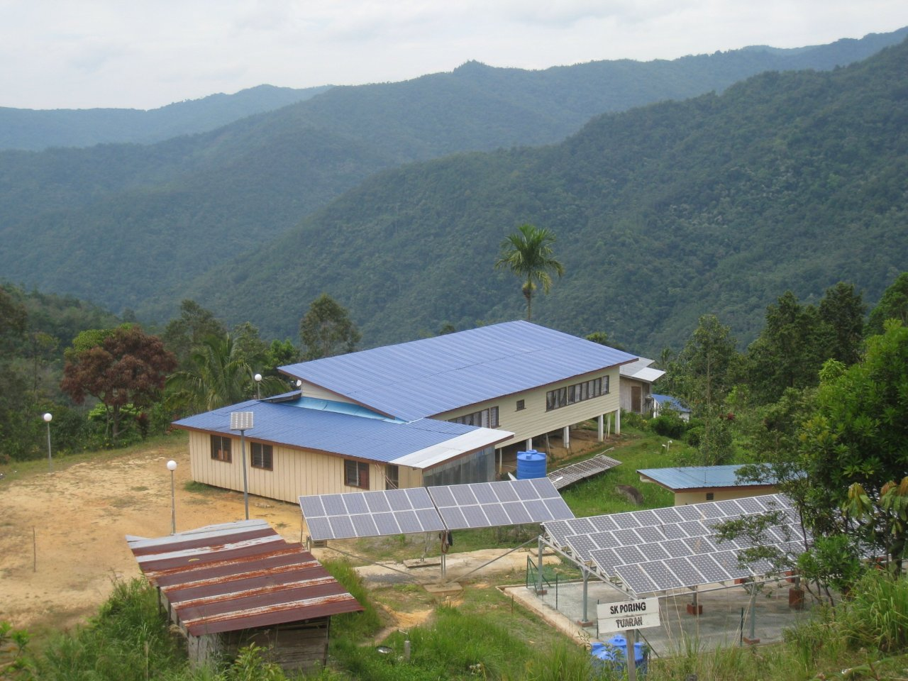 Photovoltaikhybridanlage auf Sabah/Malaysia